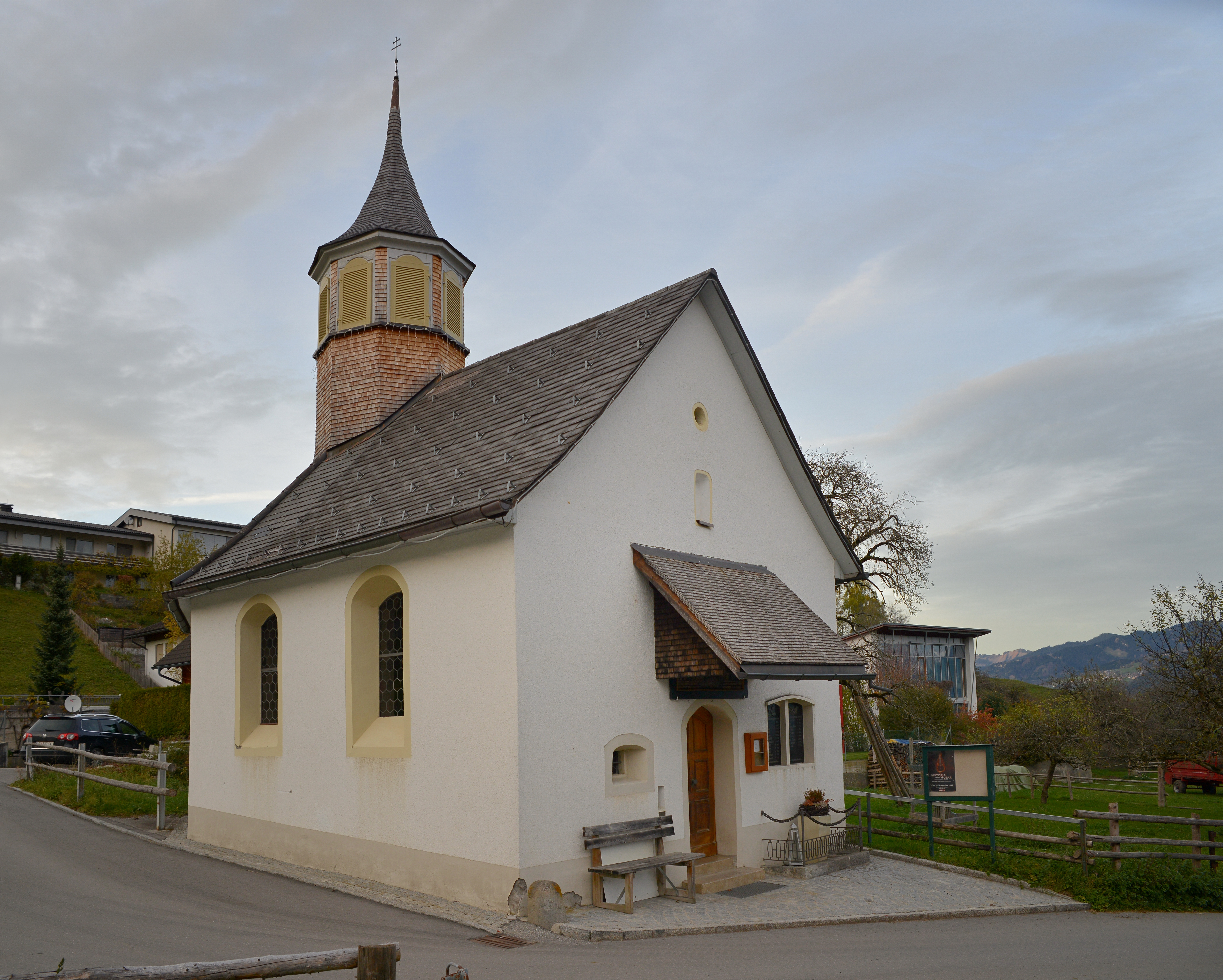 Kapelle Mariä Opferung in Amerlügen an der Bildgasse 4, Frastanz.